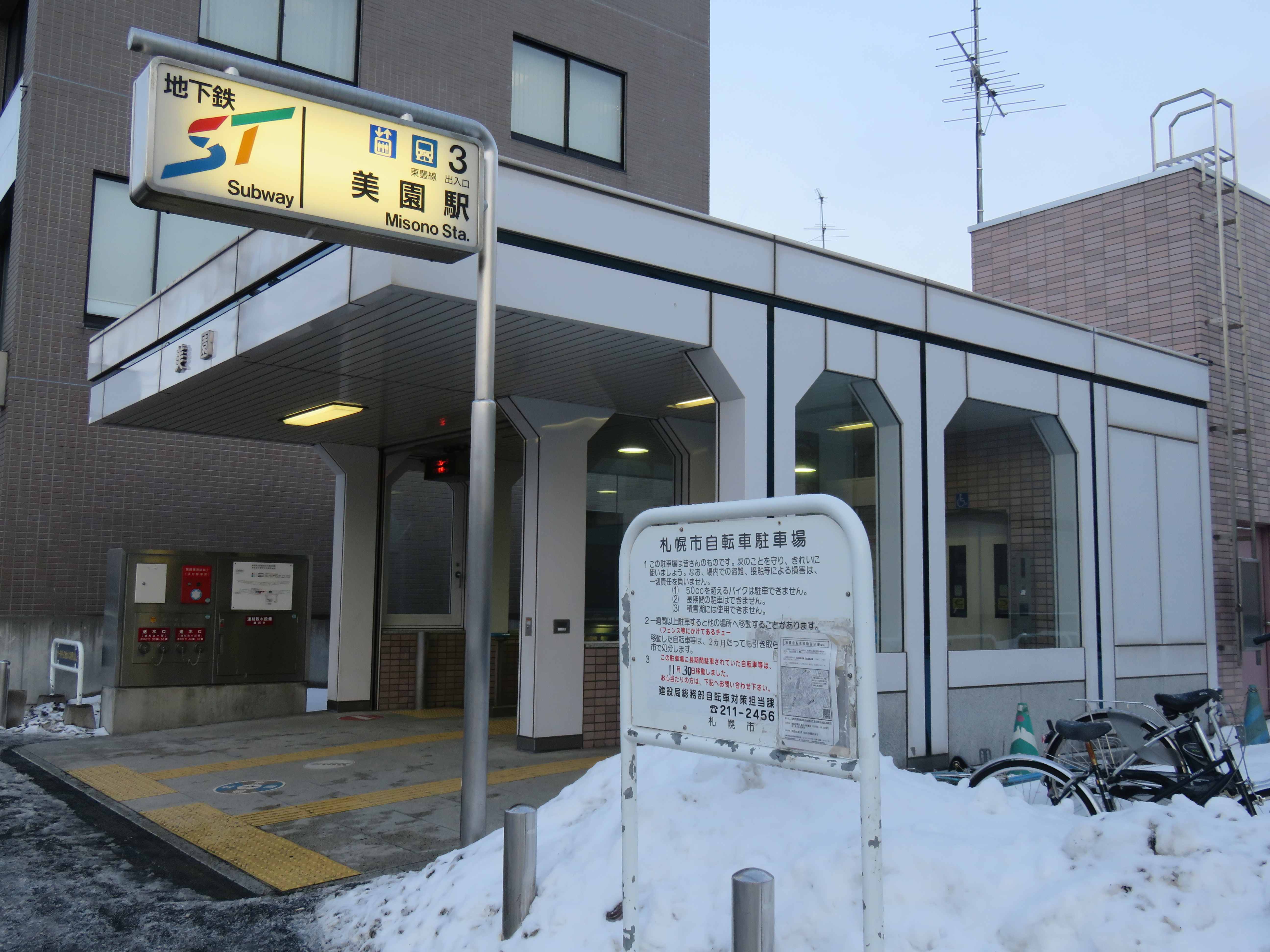 美園駅3番出入口